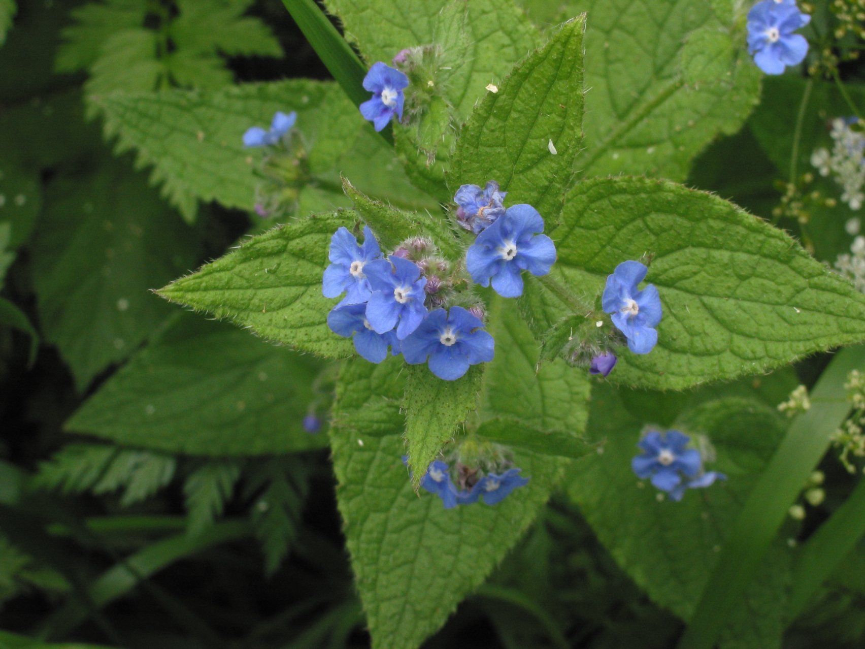 (Overblijvende ossentong)Pentaglottis sempervirens